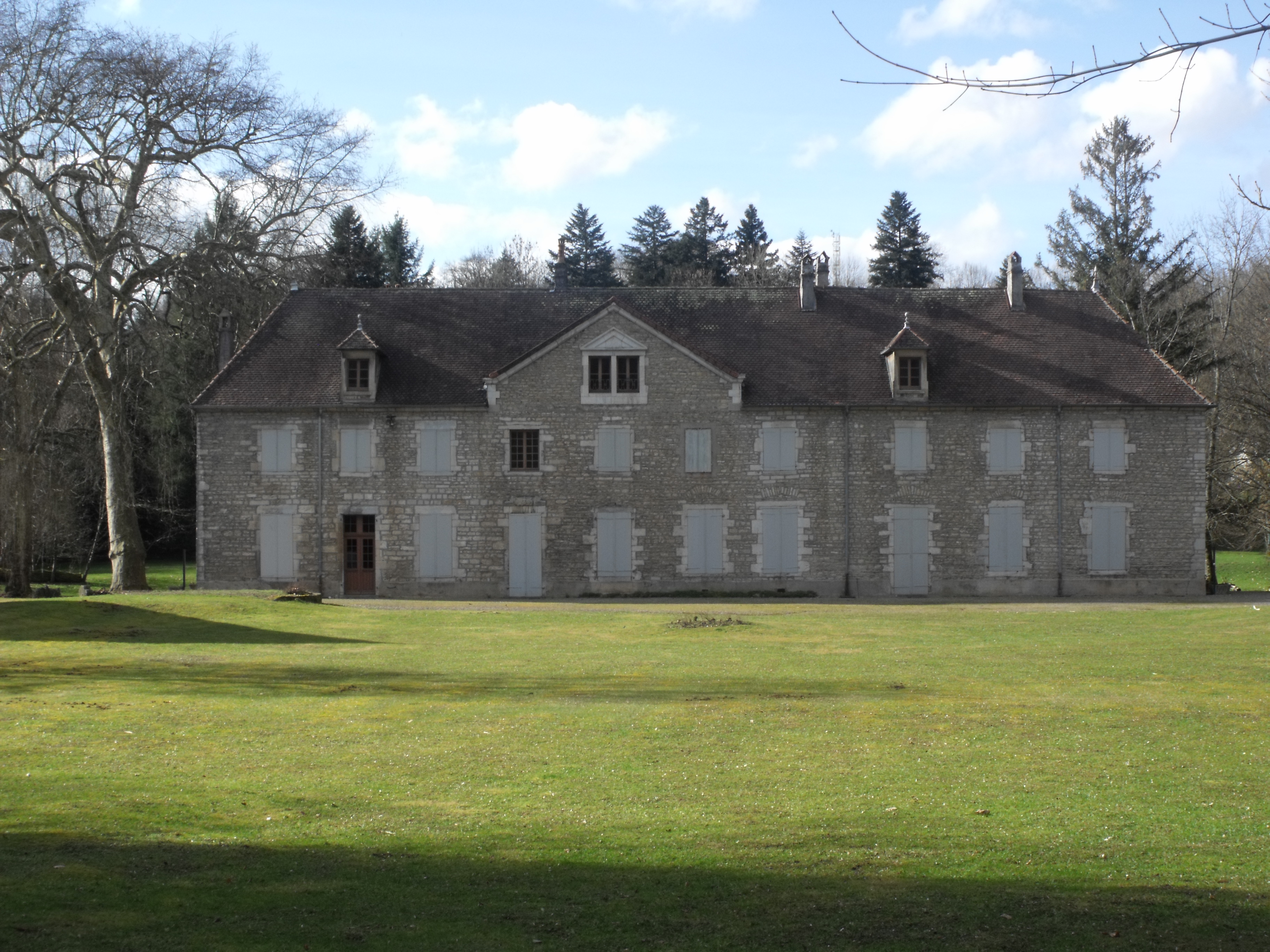 Château de Soye, Doubs, France